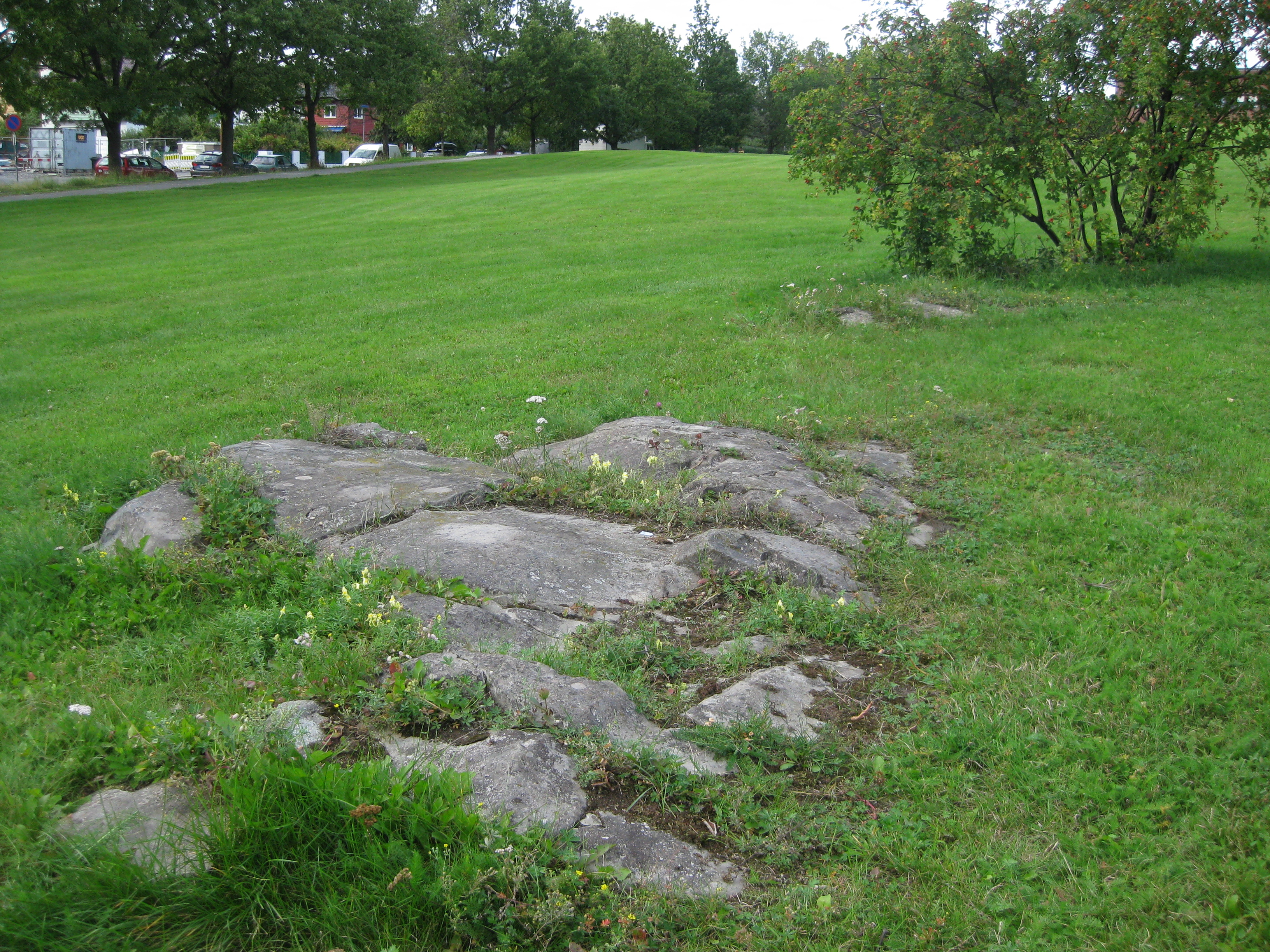 Skålgroper i Suhms gate, Oslo.